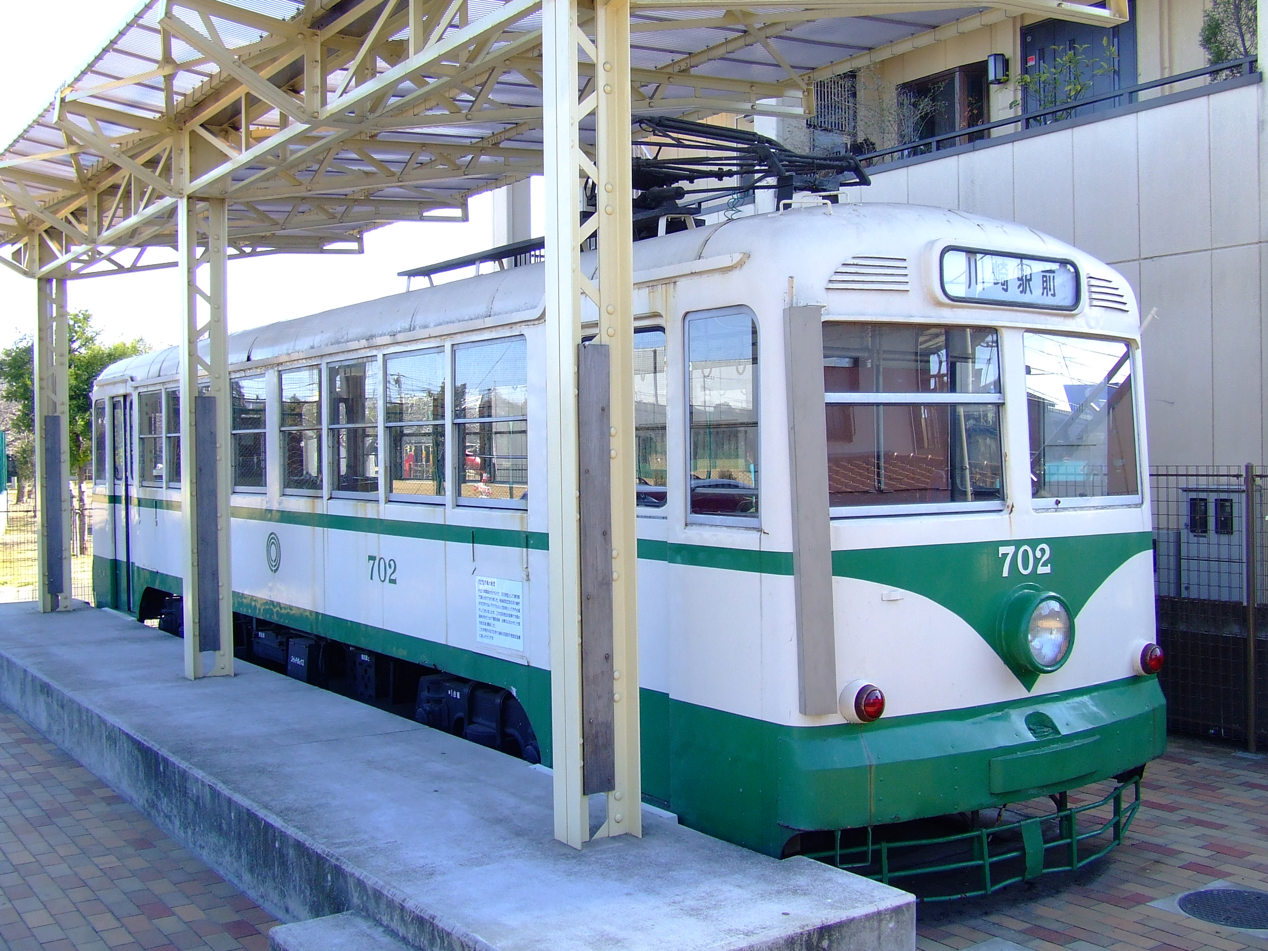 川崎市電702号車（保存車） 桜川公園にて